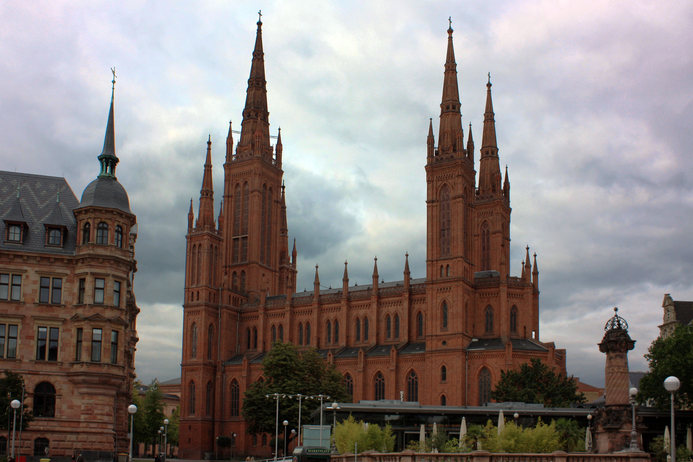 Seitenasicht, vom Dern'schen Gelände aus, der Marktkirche in Wiesbaden, Hessen nach Abschluss der Renovierung im Jahr 2008. Die Kirche wurde von Carl Boos zwischen 1853 und 1862 im Stil der Neugotik erbaut.